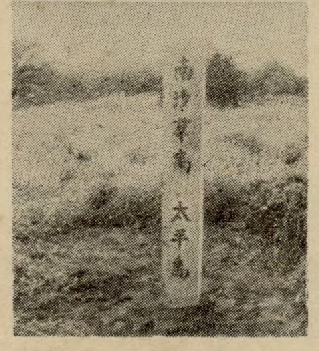 中文（中国大陆）: 中國新海軍插圖